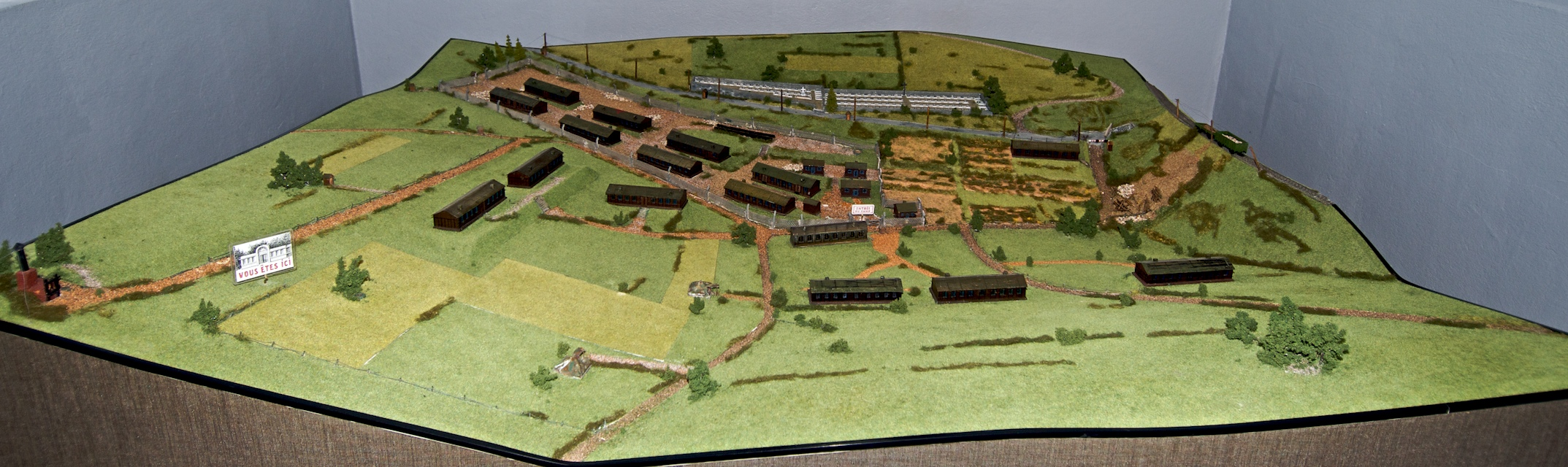 KZ-Niewelager Thil: Maquette vum Lager vum Ubaldo Marinelli aus dem Joer 1946 a restauréiert 2004.